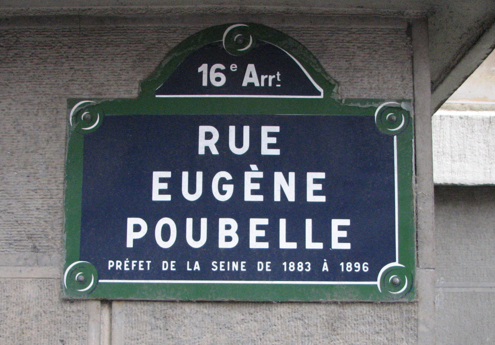 Plaque de la rue Eugène Poubelle, Paris 16e Eugene Poubelle street sign, Paris 16e